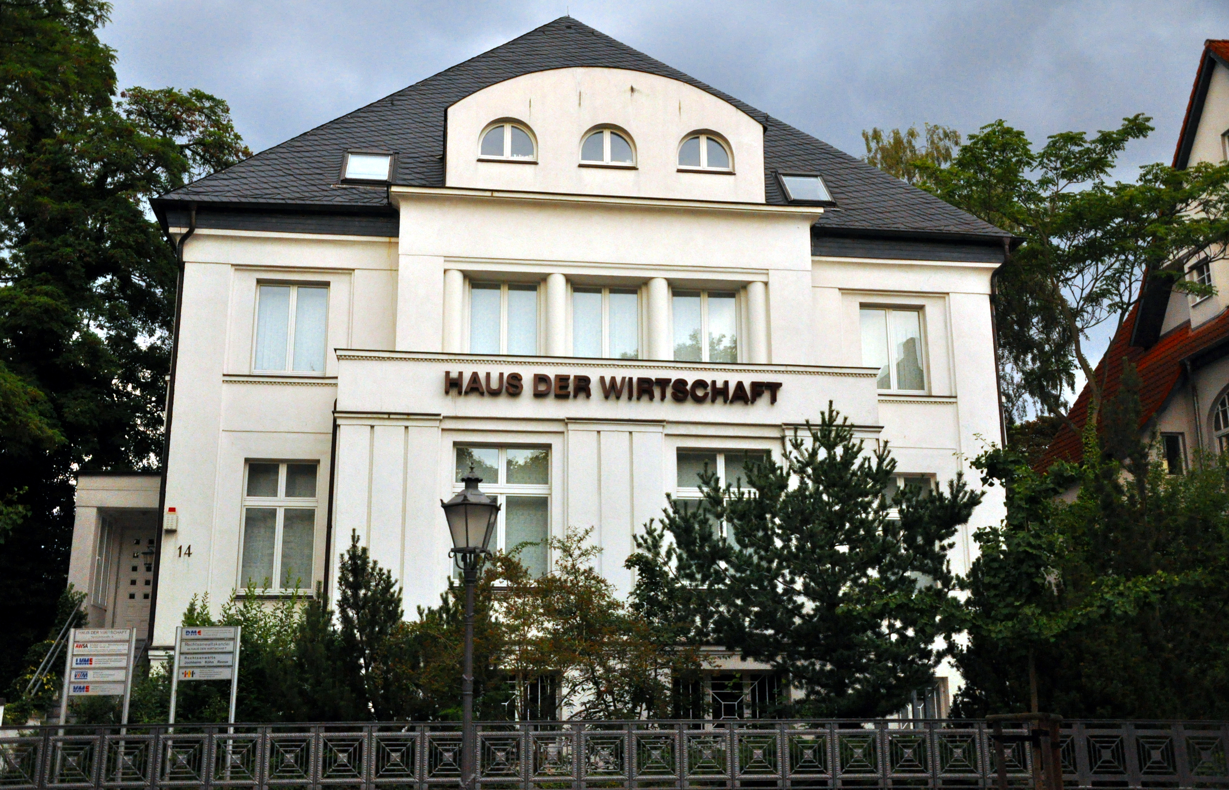 Haus der Wirtschaft, Magdeburg